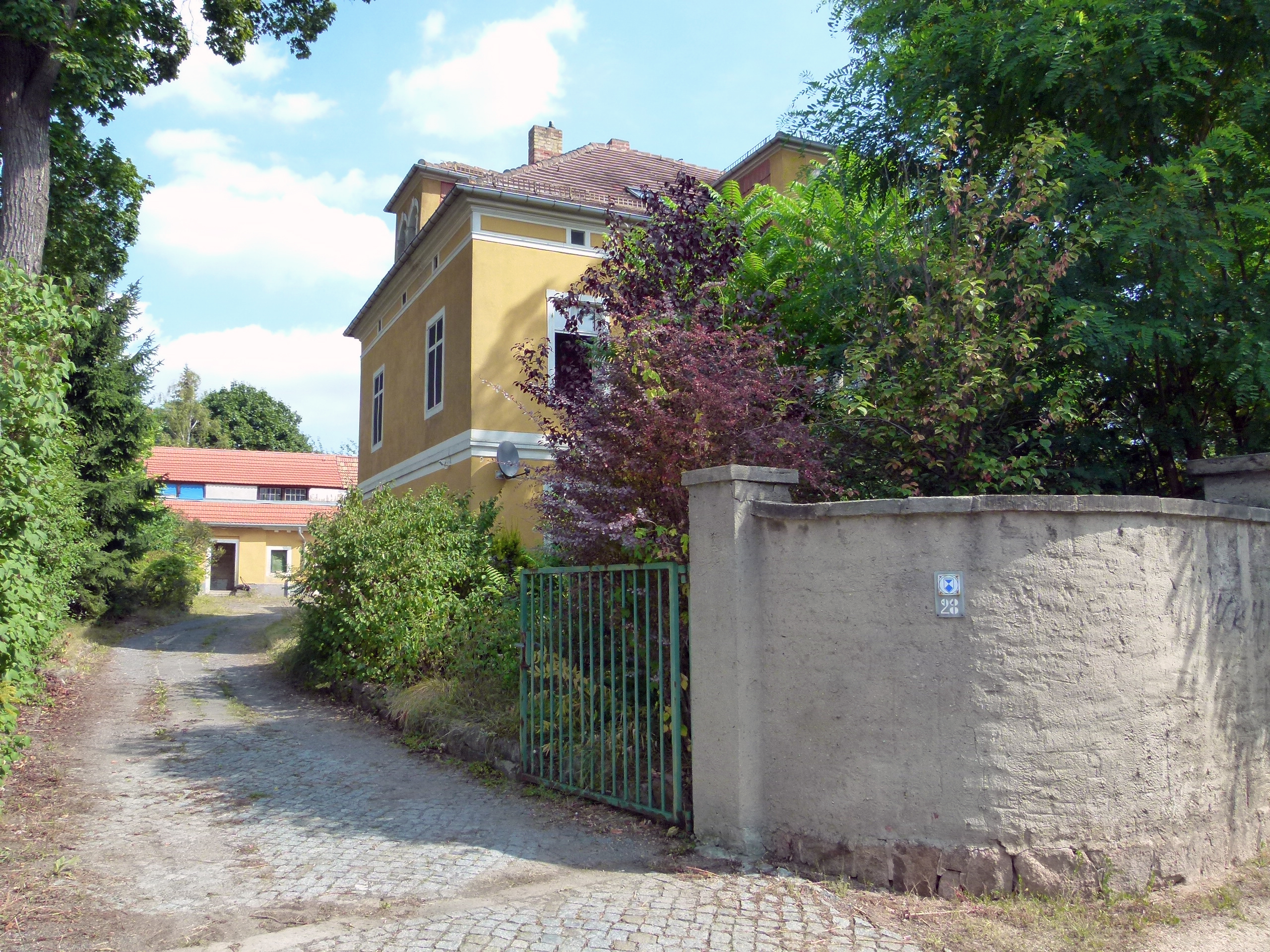 Denkmalgeschütztes Haus, Winzerstraße 28, Radebeul, Sachsen